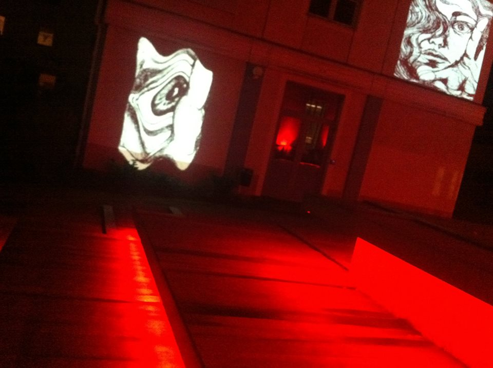 Ljusinstallationen Den vita porten på en innergård vid Mälardalens högskola, från Nattljus 2014.